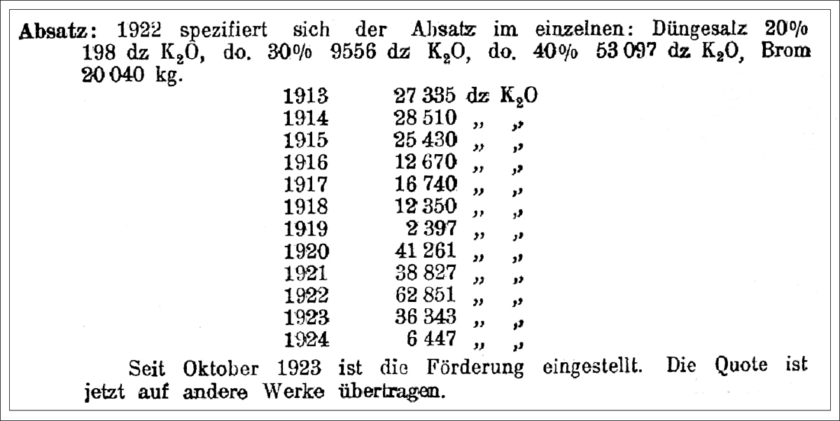 Produkt-Absatz des Kaliwerkes Heldrungen II.